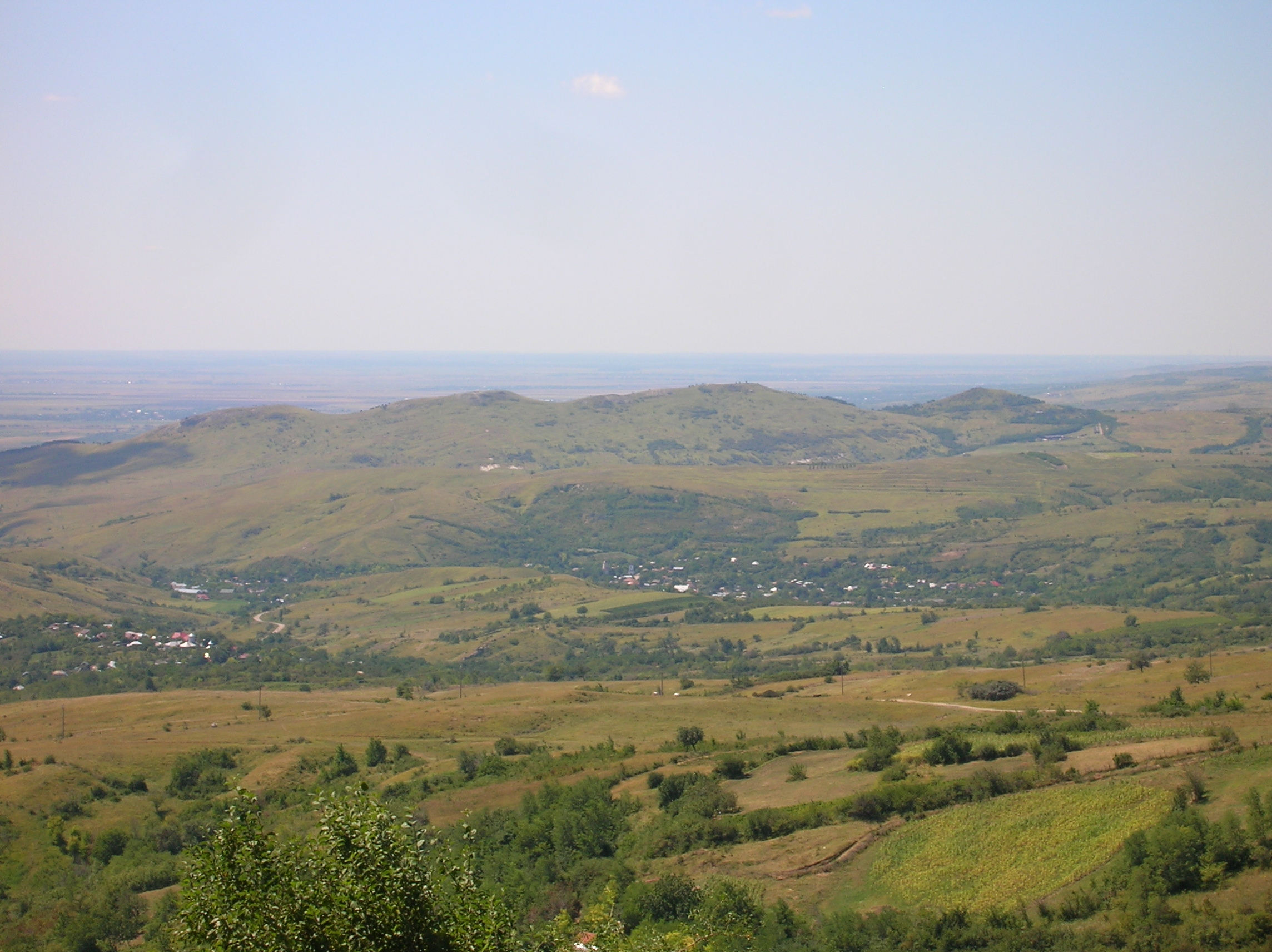 Dealul Istrița, județul Buzău, România: de lângă Biserica dintr-o piatră spre microdepresiunea Fințești